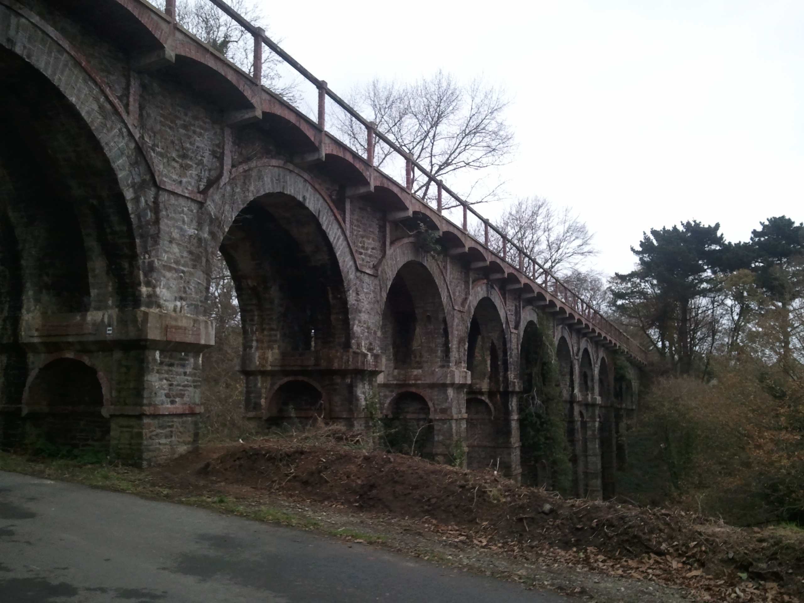 Viaduc de Kerdéozer, Plouguiel, France, 12/2012